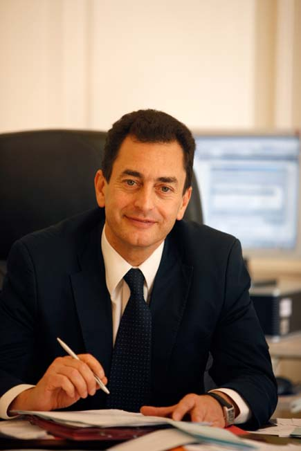 Portrait Eric chevallier